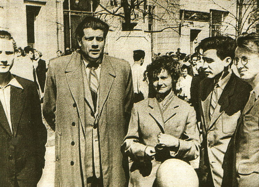 Беларуская (тарашкевіца): На Першамайскай дэманстраціі. Янка Сіпакоў , Іван Навуменка, Ніна Маеўская, Барыс Сачанка, Юрась Свірка. 1958 год.